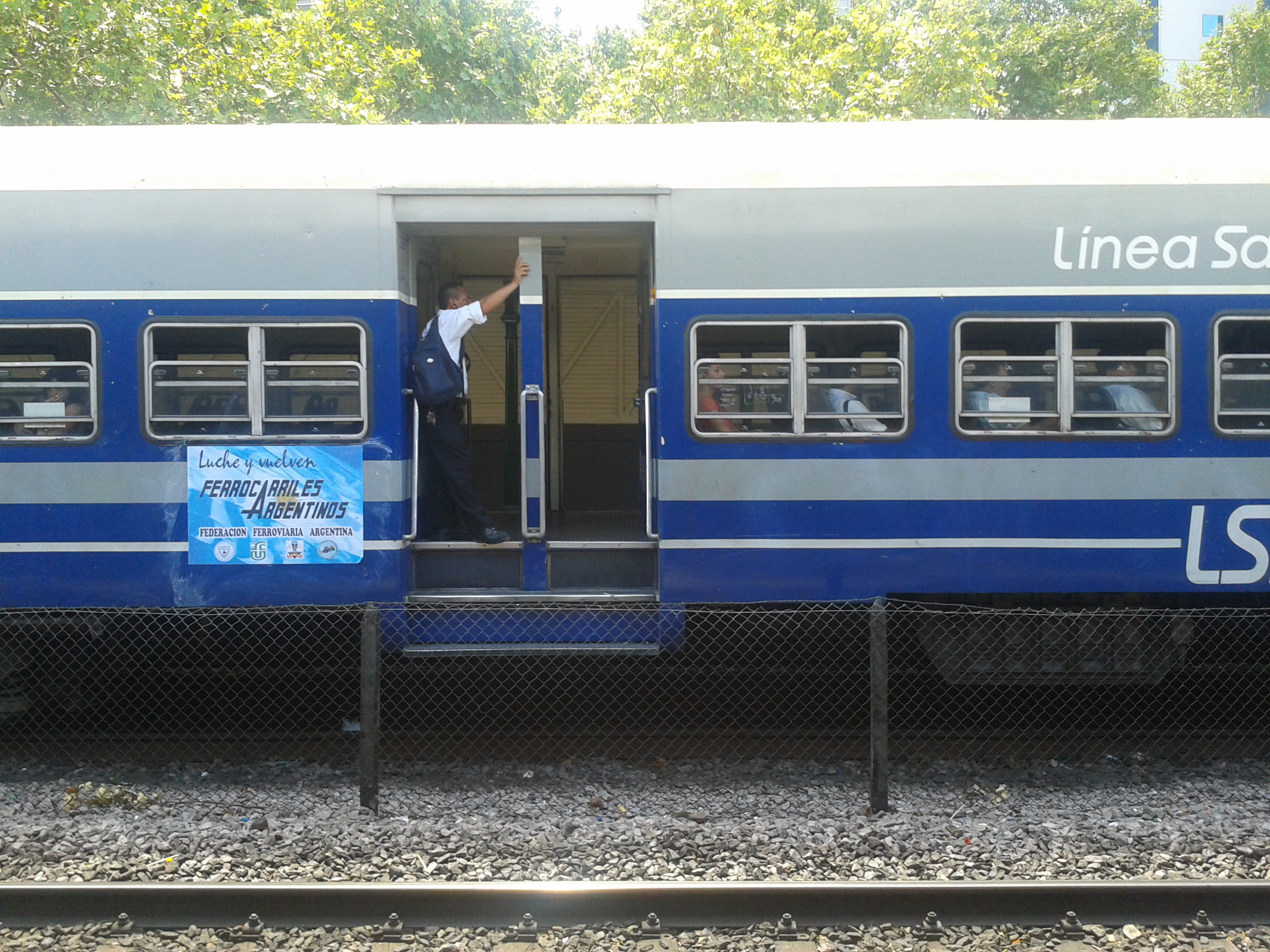 Antes de la elevación.